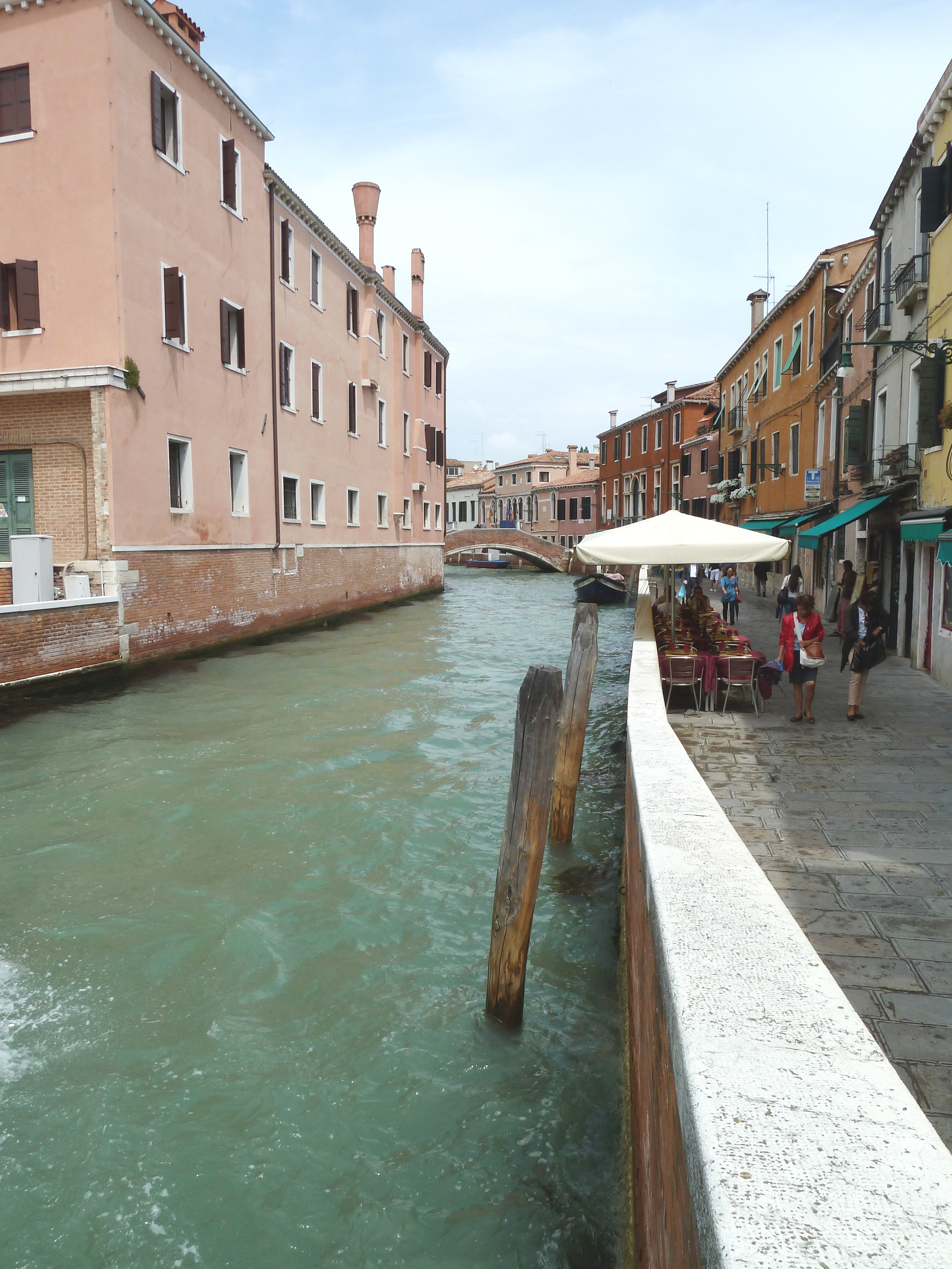 Rio de San Basegio (Venice)